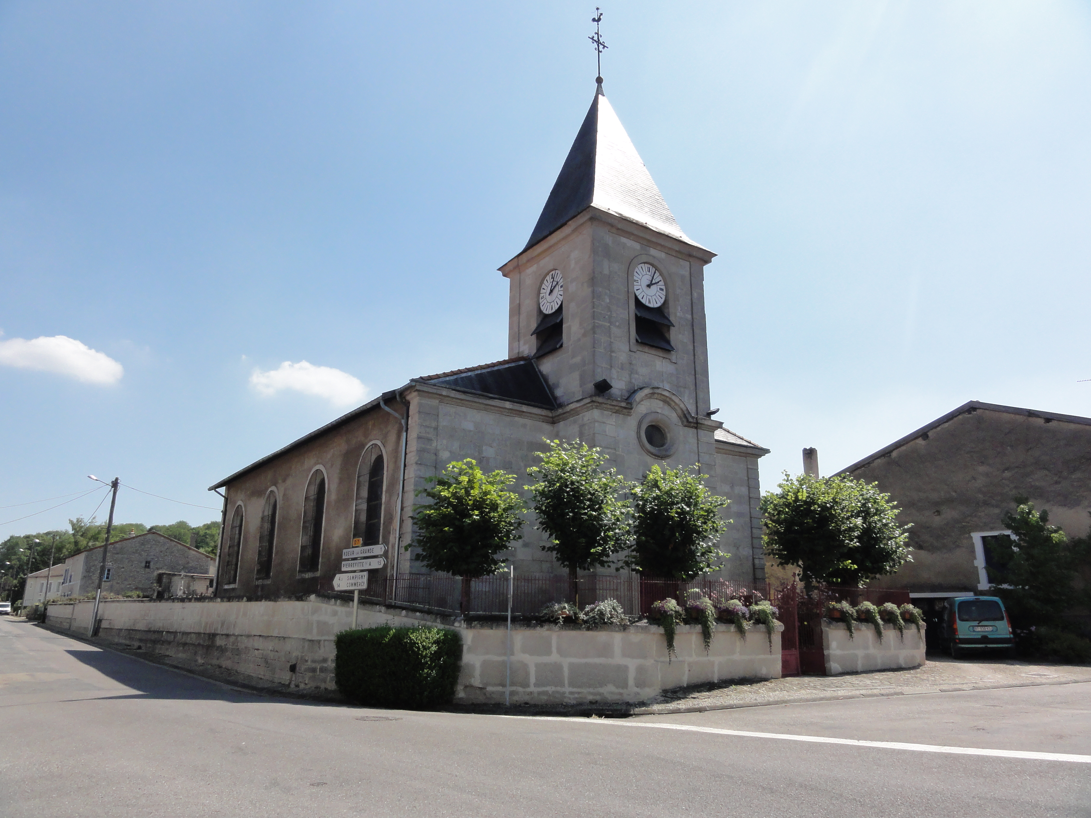 Kœur-la-Petite (Meuse) église